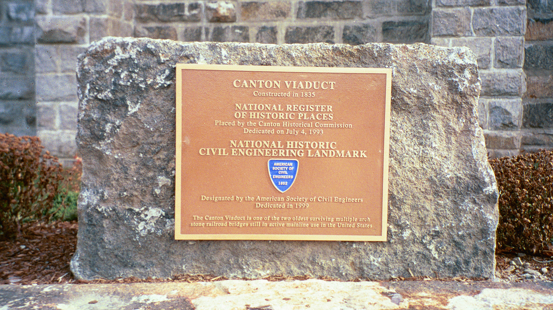 Canton Viaduct Commemorative Plaque